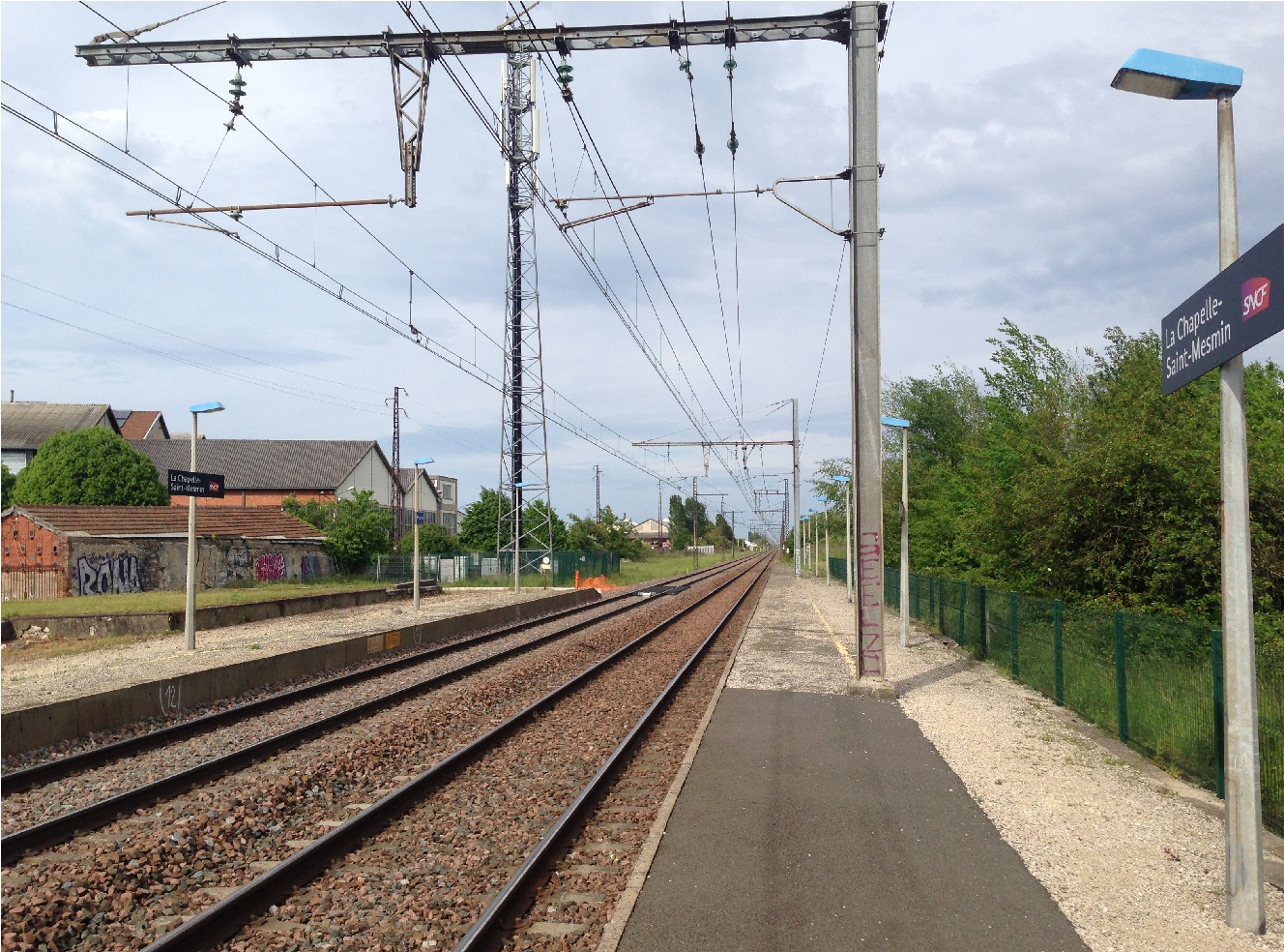 Gare de La Chapelle-Saint-Mesmin